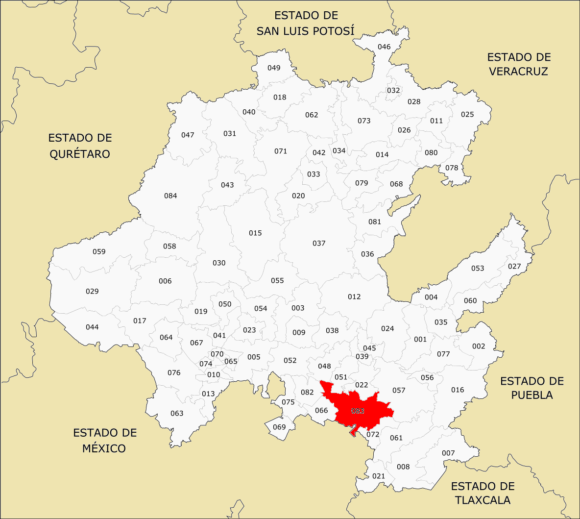 Municipios de Hidalgo